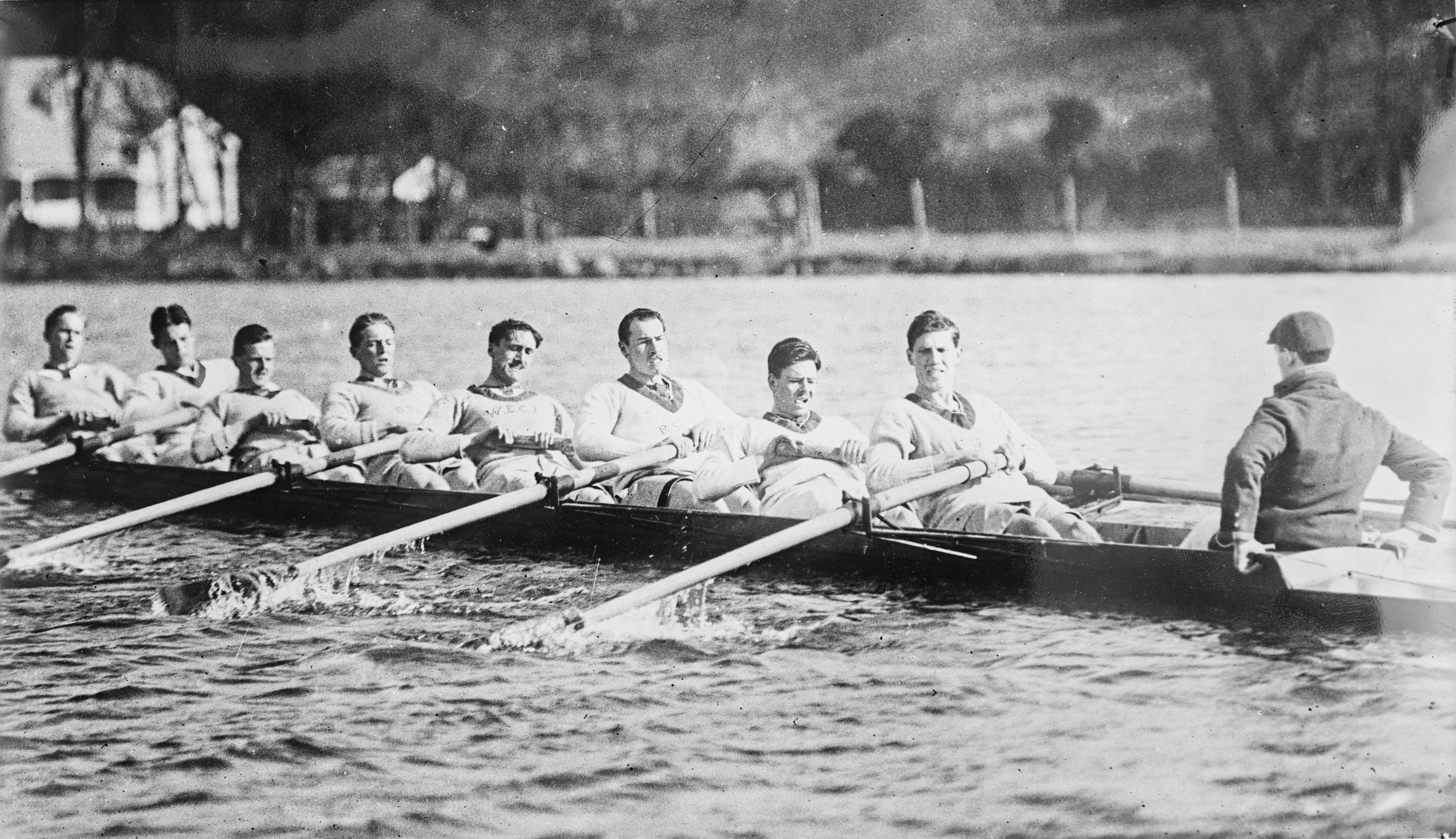 Equipe [d']Oxford [match annuel à 8 rameurs contre l'université de Cambridge sur la Tamise]